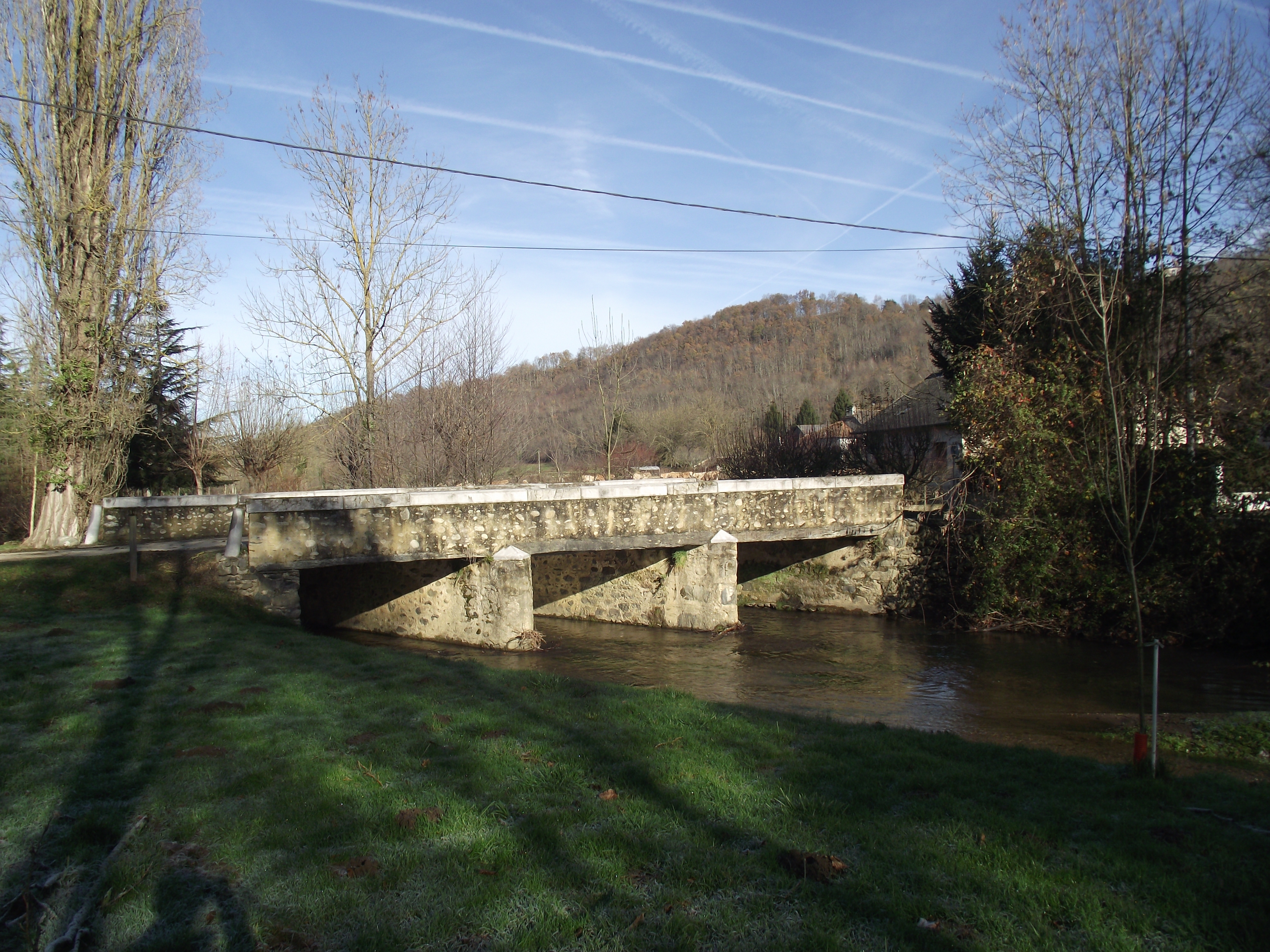 Pont Saint-Vincent (Orincles, Hautes-Pyrénées, France)